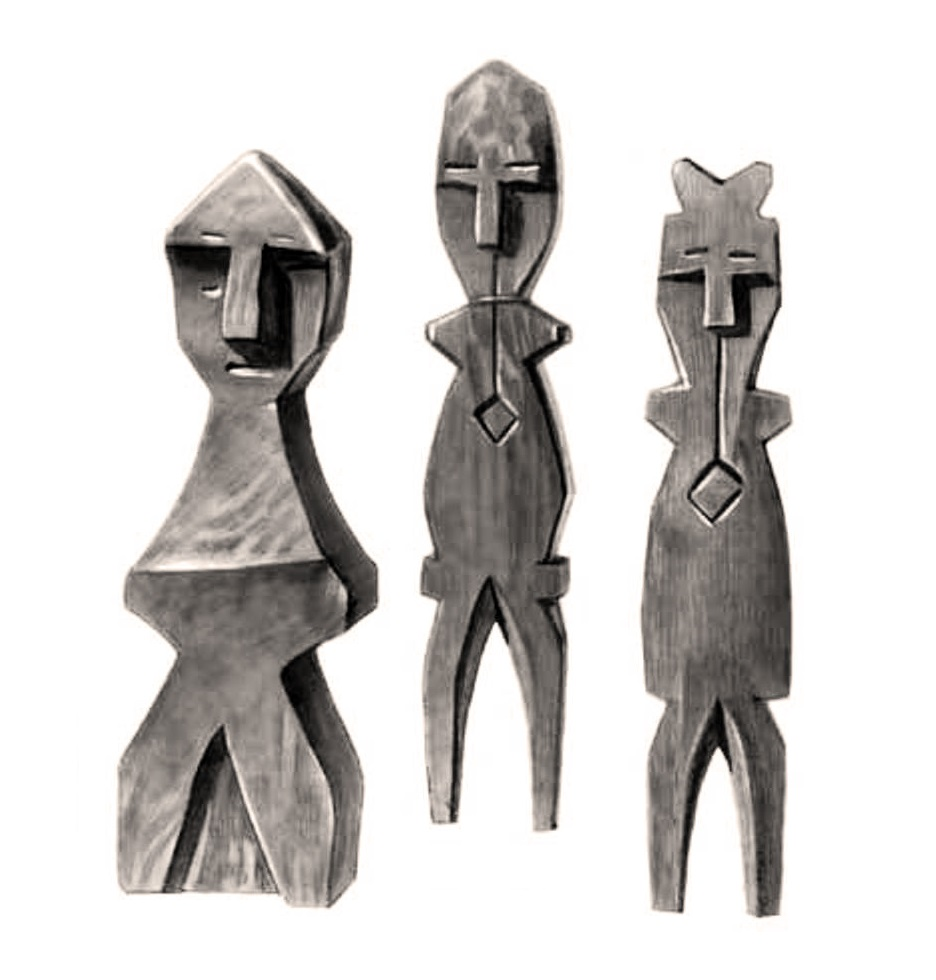 Пупыги — в мансийской мифологии духи-покровители людей, духи предков. Материал: дерево. Музей антропологии и этнографии, Санкт-Петербург.